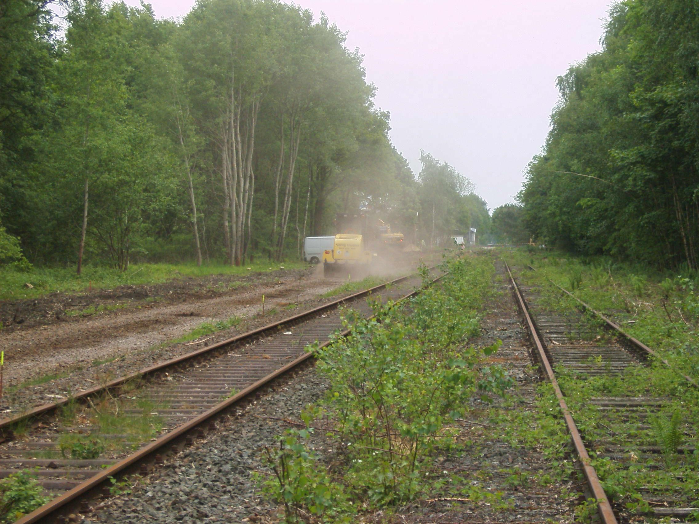 Bau des Bahntrassenradweges „Schlossallee“ in Bereich des ehemaligen Bahnhof St. Arnold. Auf der linken Seite entsteht der Radweg, die sichtbaren Schienenstränge bleiben erhalten und sollen unter anderem für Draisinen genutzt werden.